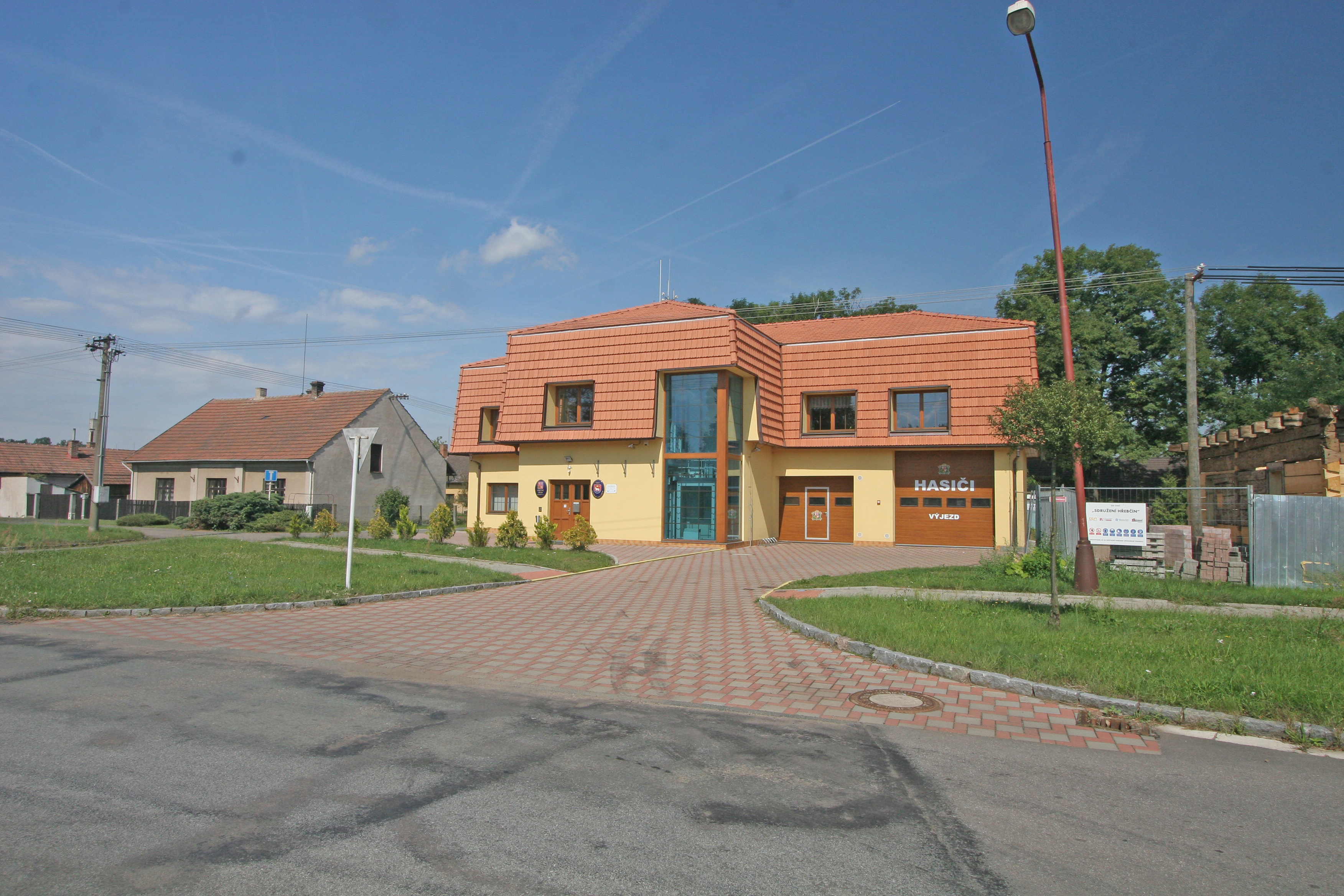 Kladruby nad Labem obecní úřad